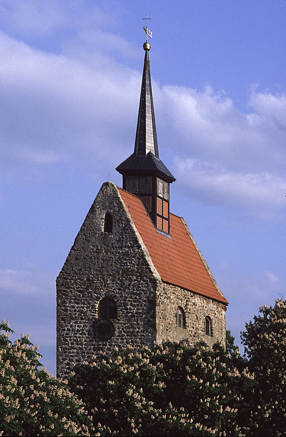 Beschreibung: Kirchturm von Winterfeld mit blühenden Kastanien Quelle:eigenes Dia Datum:02.Feb.2007 Autor:Hein_Elpers